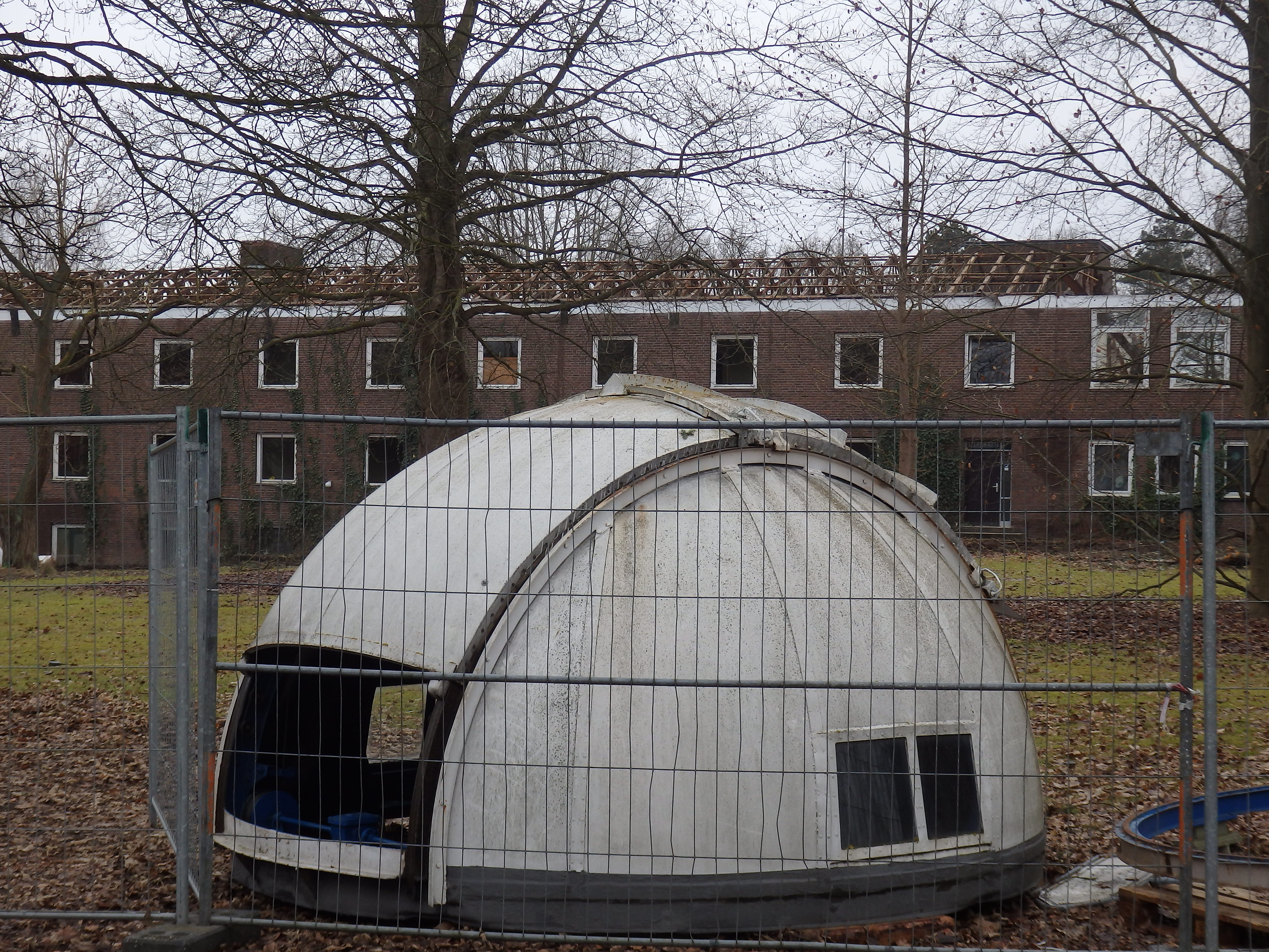 Abriss der Sternwarte Lübeck, Februar 2017